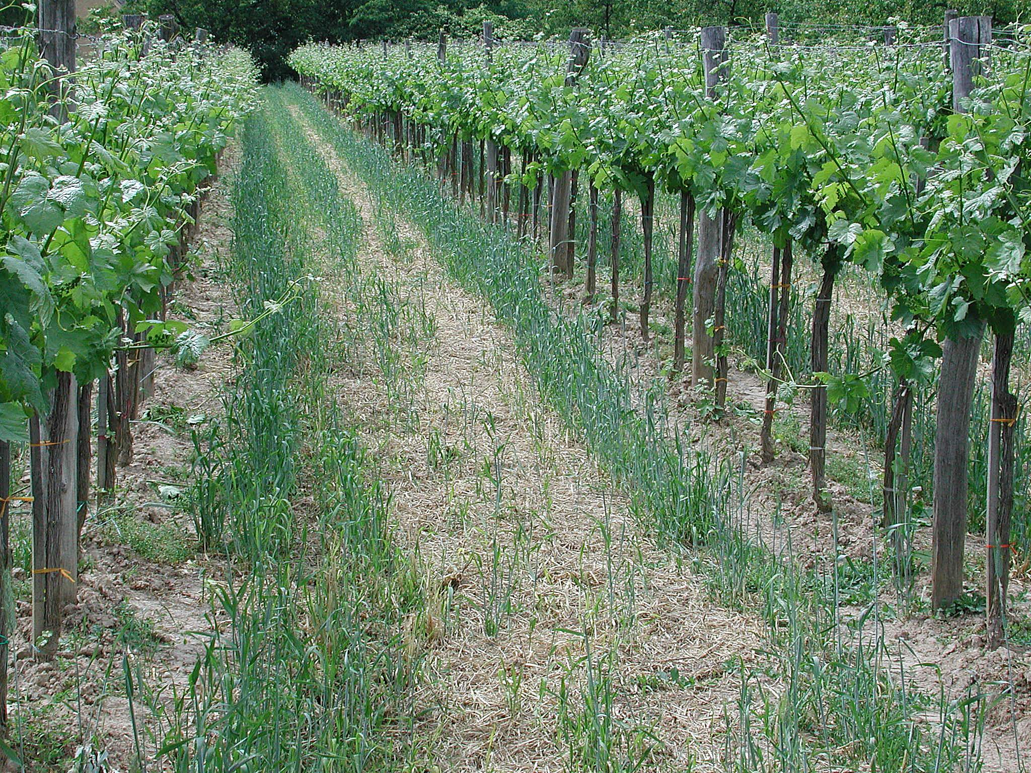 Bodenbegrünung in einem Weingarten